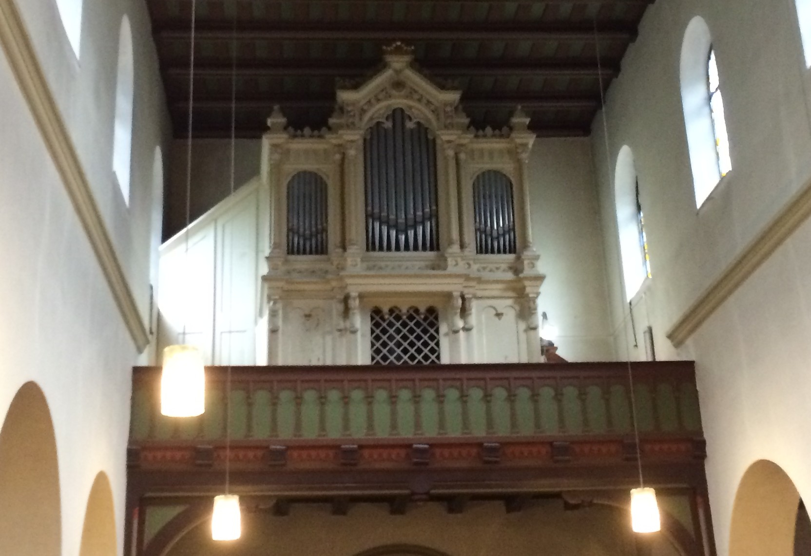 Orgel der Wallfahrtskirche Germershausen